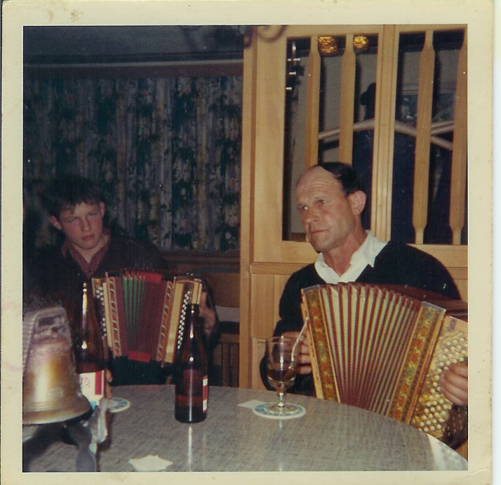 Alois Lüönd mit Bäredi im Jahre 1968 in einem Lokal. Bei Bäredi lernte Alois die erstenn Stücke mit dem Schwyzerörgeli.